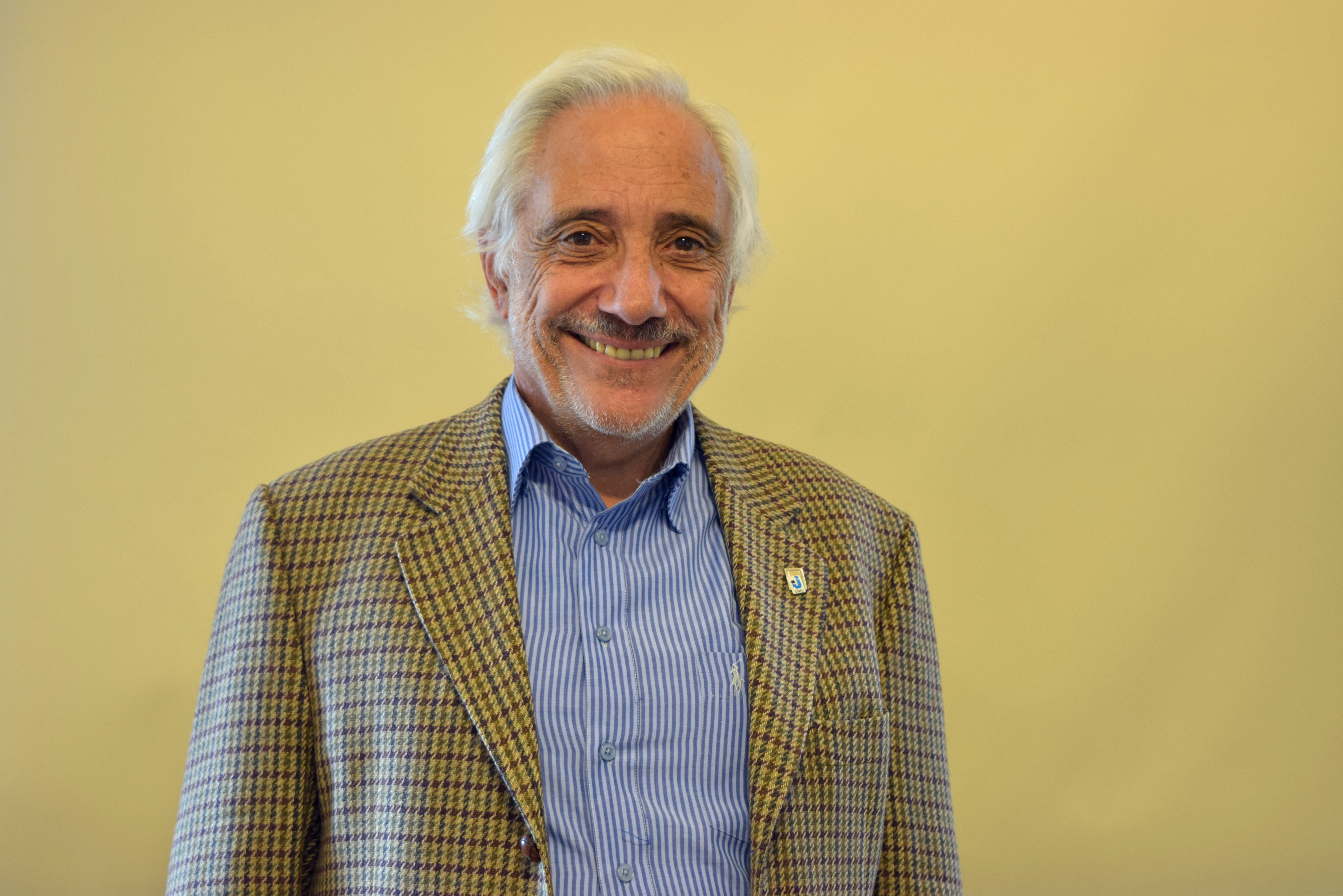 Rector de la Universidad Nacional Arturo Jauretche